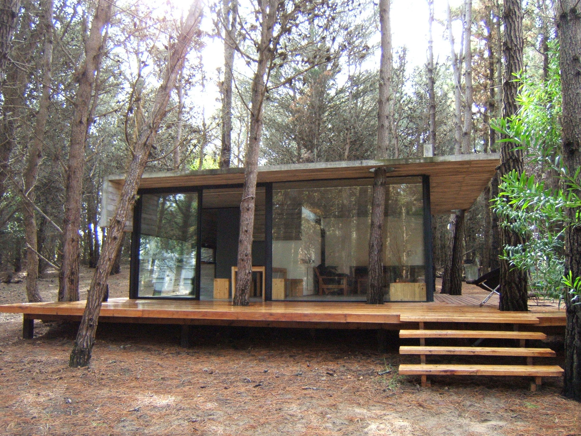 Casa de hormigón a la vista en el bosque de Mar Azul, Argentina